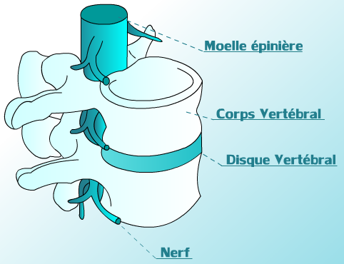 Ceci est un schéma de notre moelle Épinière (Colonne vertébrale)